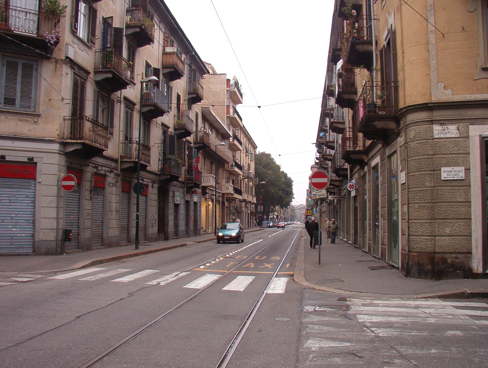 Via Chiesa della Salute - Torino - Italy